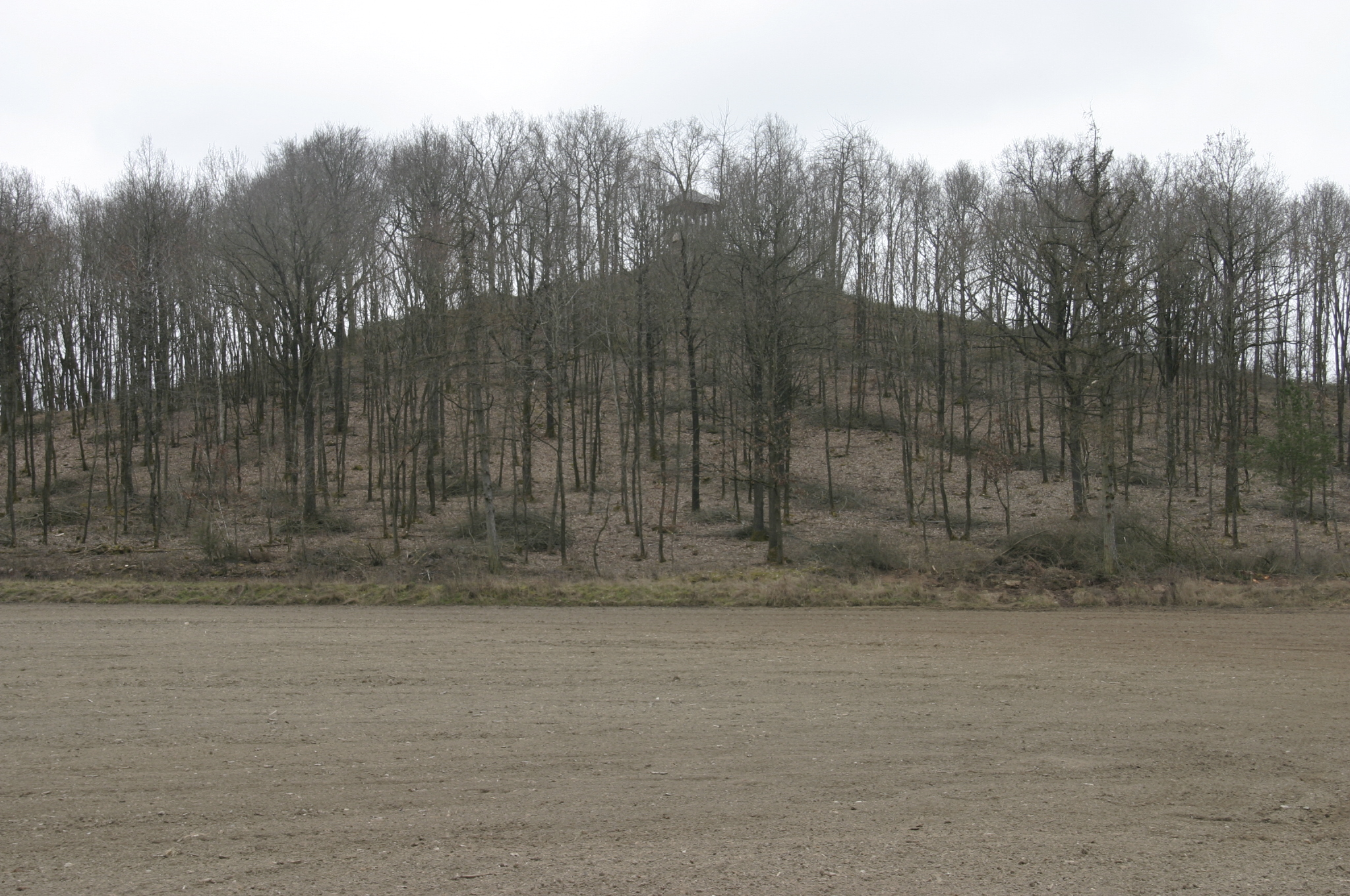 Kunigundenturm auf dem Spielberg über Rüdisbronn